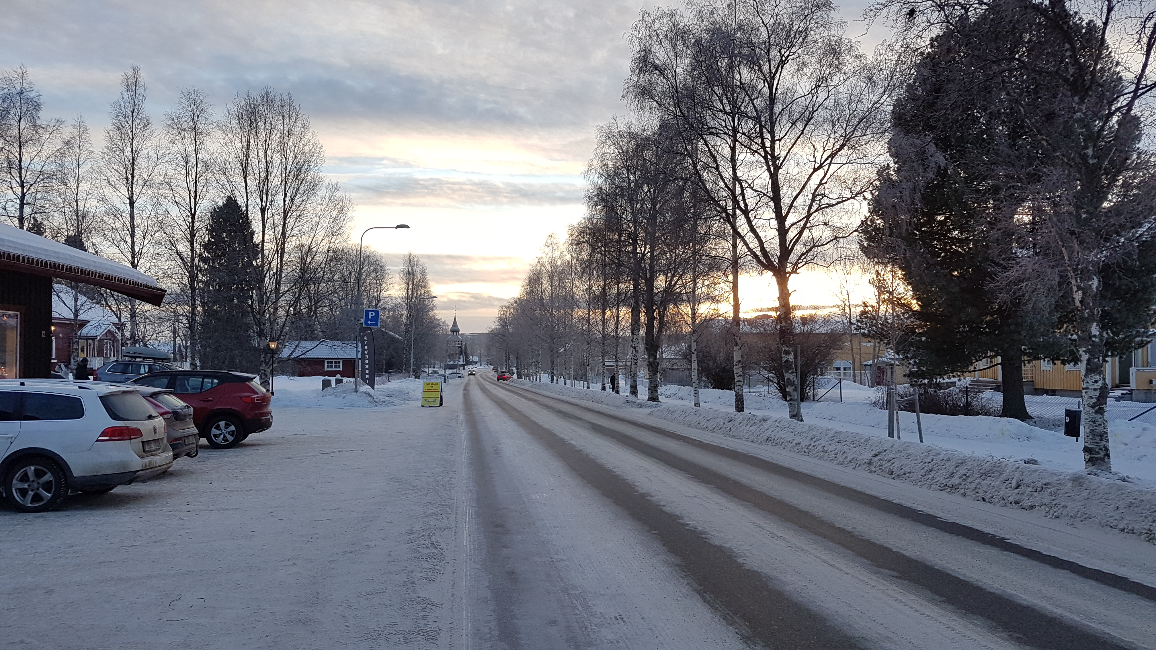 Vemdalen 2018